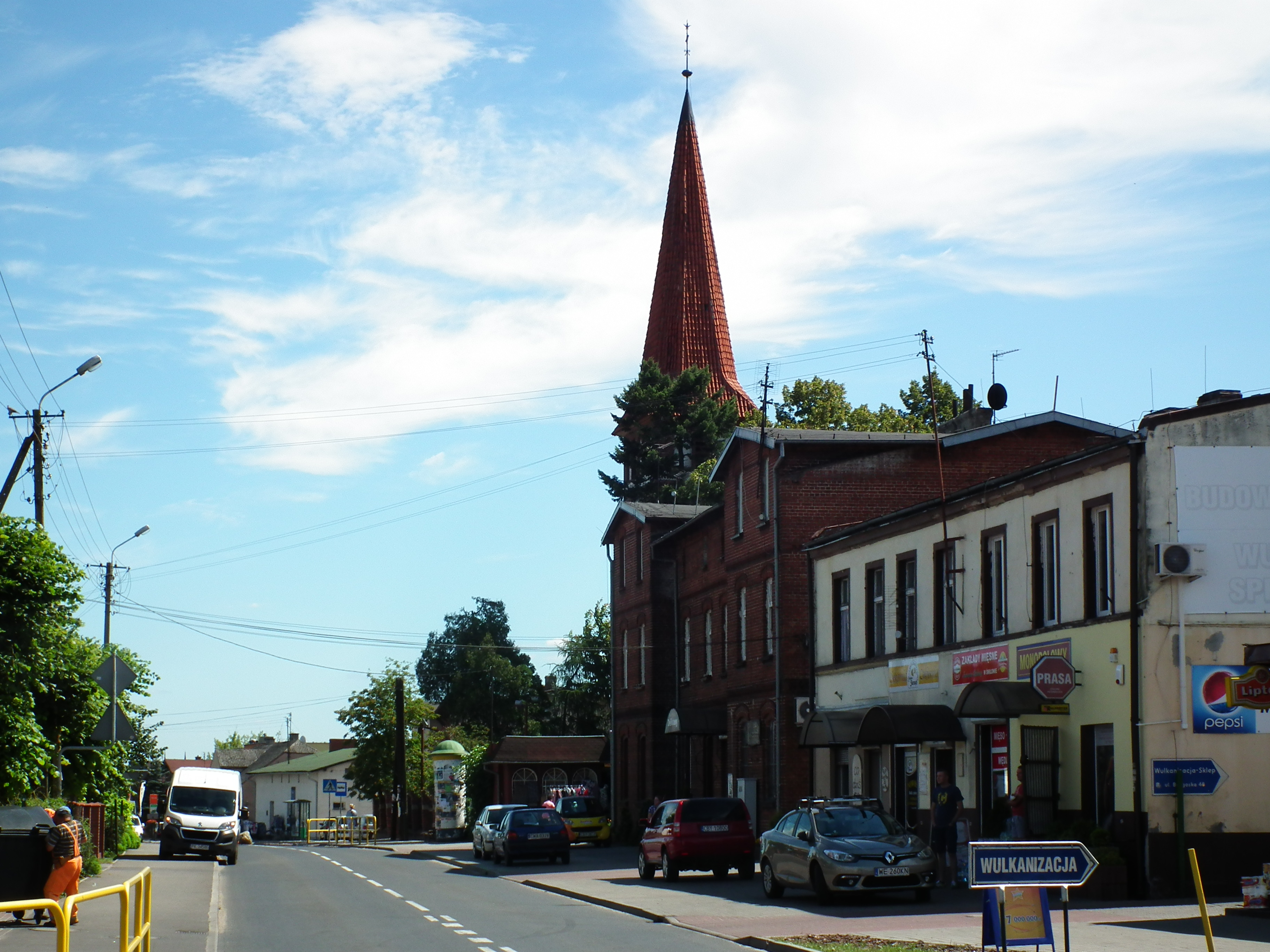 Dąbrowa Chełmińska. Centrum.